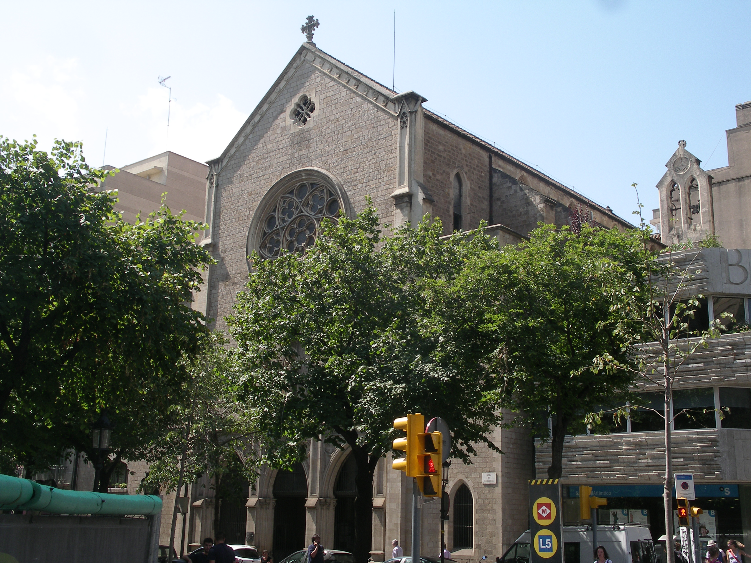 Església de Sant Ramon de Penyafort de Barcelona, a la Rambla de Catalunya, antiga església del Monestir de Montsió, al Portal de l'Àngel. Edifici del s. XIV traslladat a la ubicació actual al s. XX